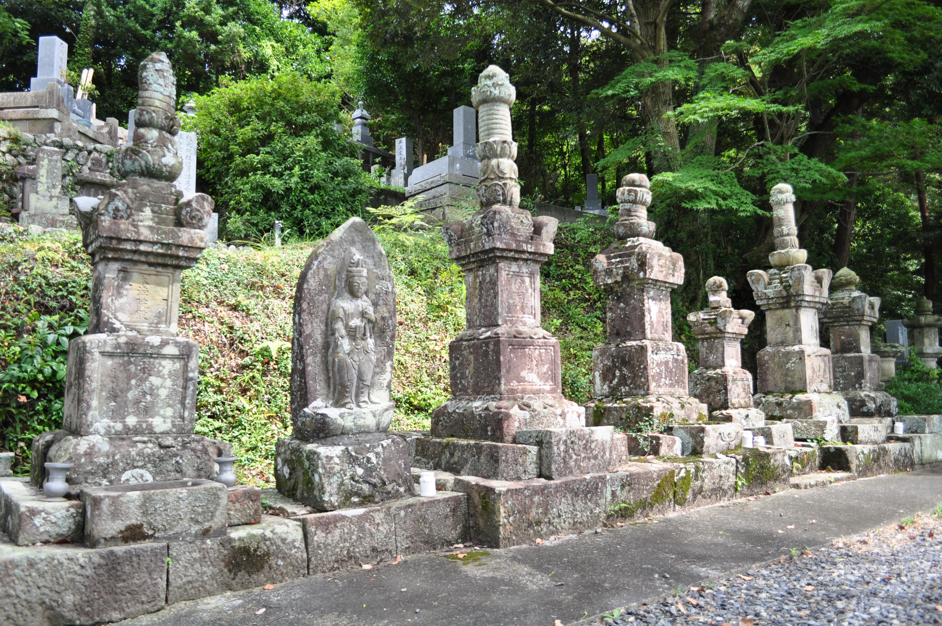 過去帳には草深与力の記載で、駿府城定番与力十騎の中に河野、今井、田代三家の名がある。今井家の墓地は百段を登ったところにあり、初代今井半衛門、二代目市兵衛等六基並んでいる。